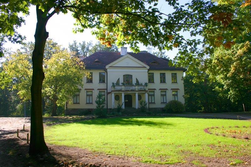 Подкова Лешна.